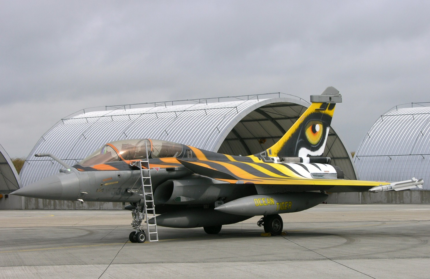 Tiger Eye Rafale